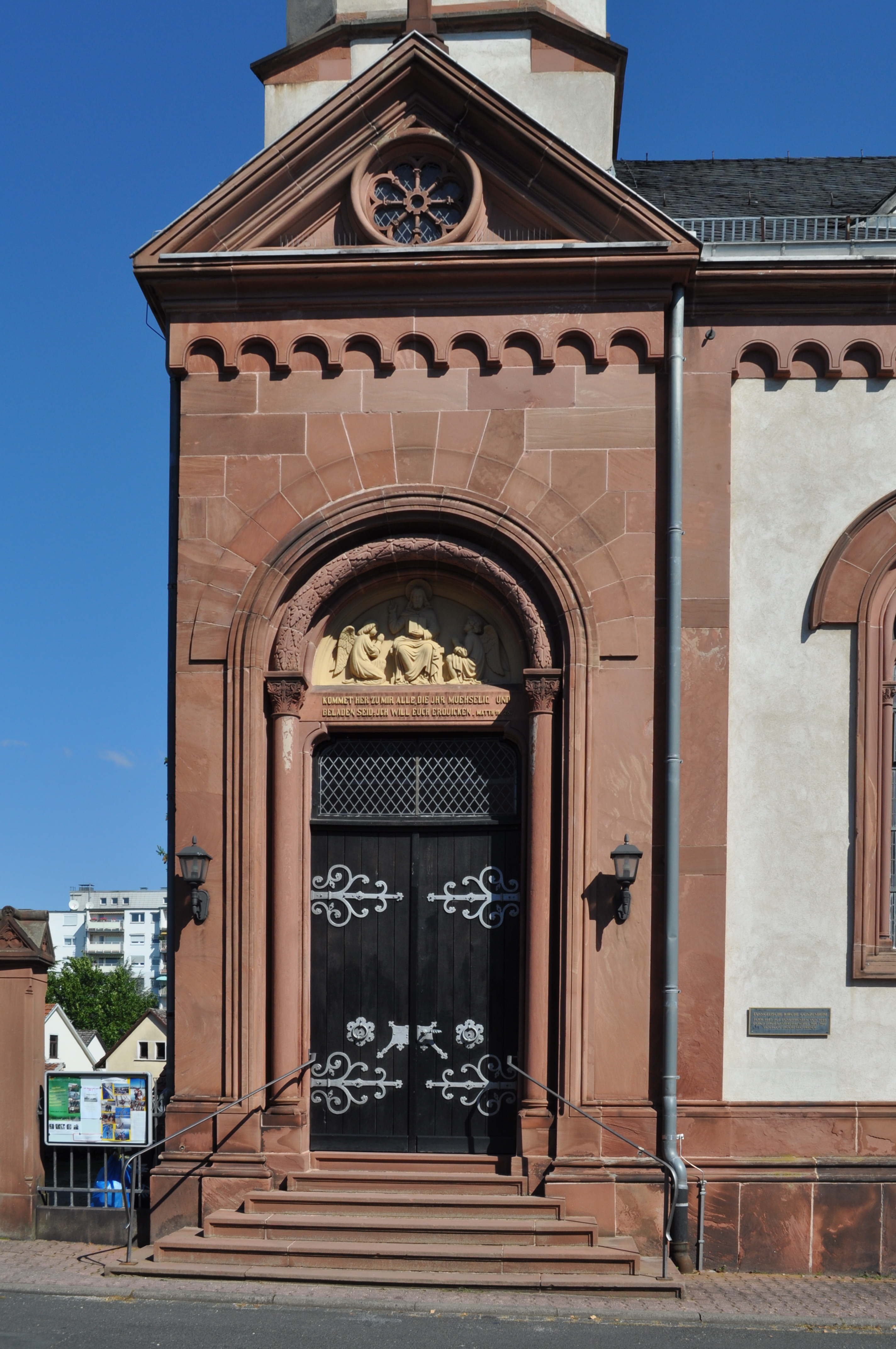 Tür der evangelischen Kirche in Gonzenheim